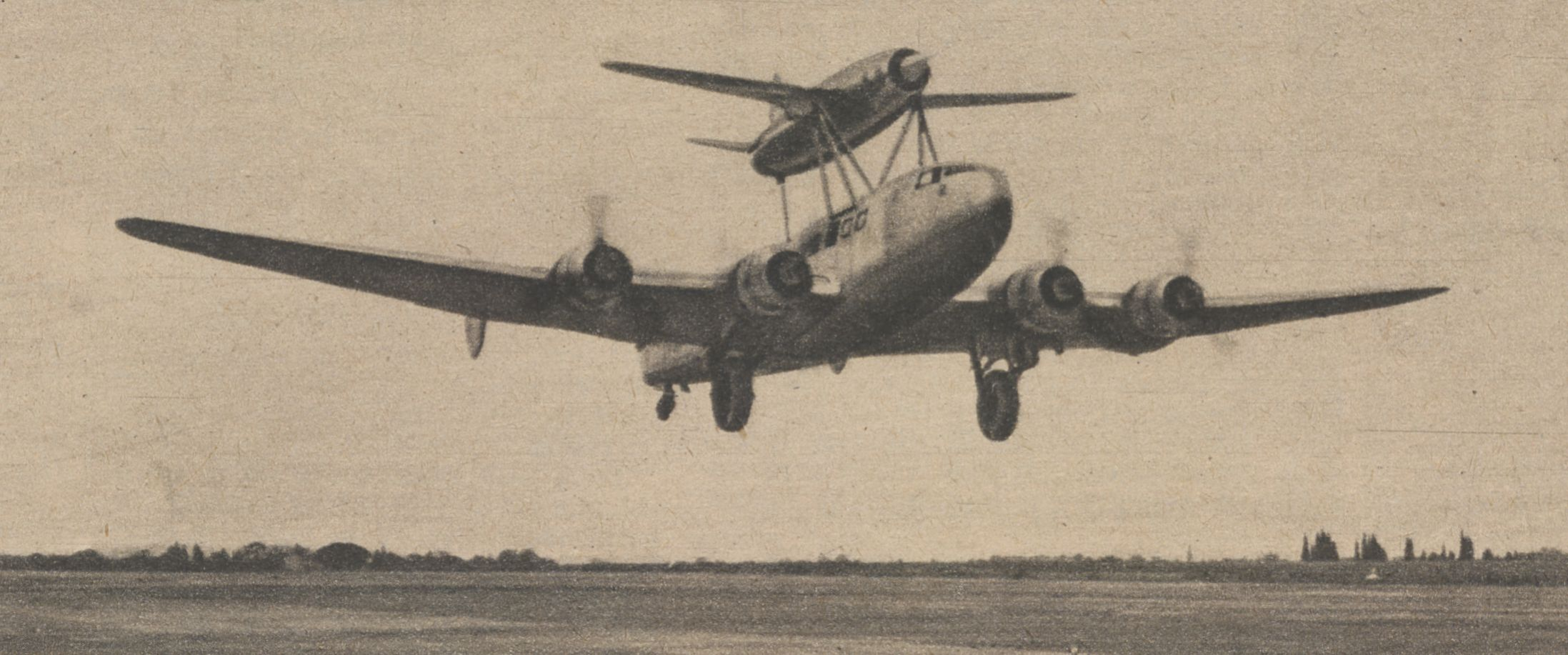 Nous avons indique dans notre dernier numéro dans quelles conditions le prototype expérimental à stato-réacteur Leduc 010 a fait son premier vol, porté par le Languedoc no 06 spécialement aménagé. Voici une photo Impressionnante de ce premier décollage. On voit nettement, sur le quadrimoteur, le système d'attache en trois points du Leduc, qui sera monté à 4.000 ou 5.000 mètres avant d'être largué pour les essais de plané d'abord, et ensuite les essais de la tuyère thermo-propulsive. Ces derniers essais auront lieu sans doute en Janvier.